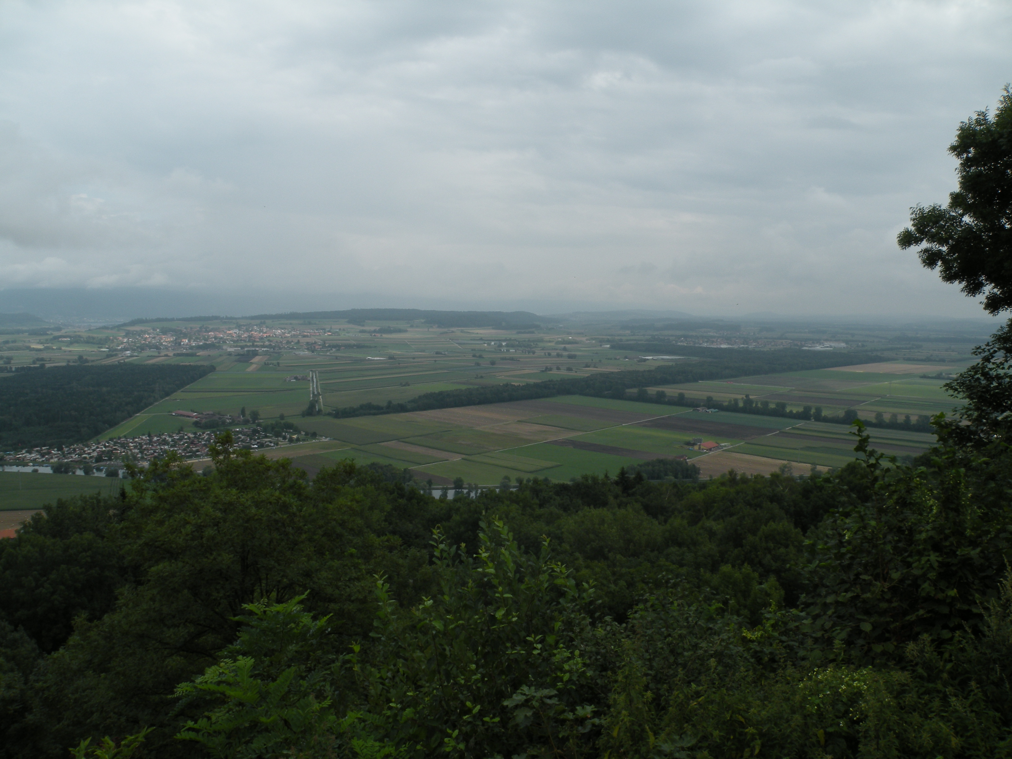 Vue du Pays des Trois Lacs depuis le mont Vully.